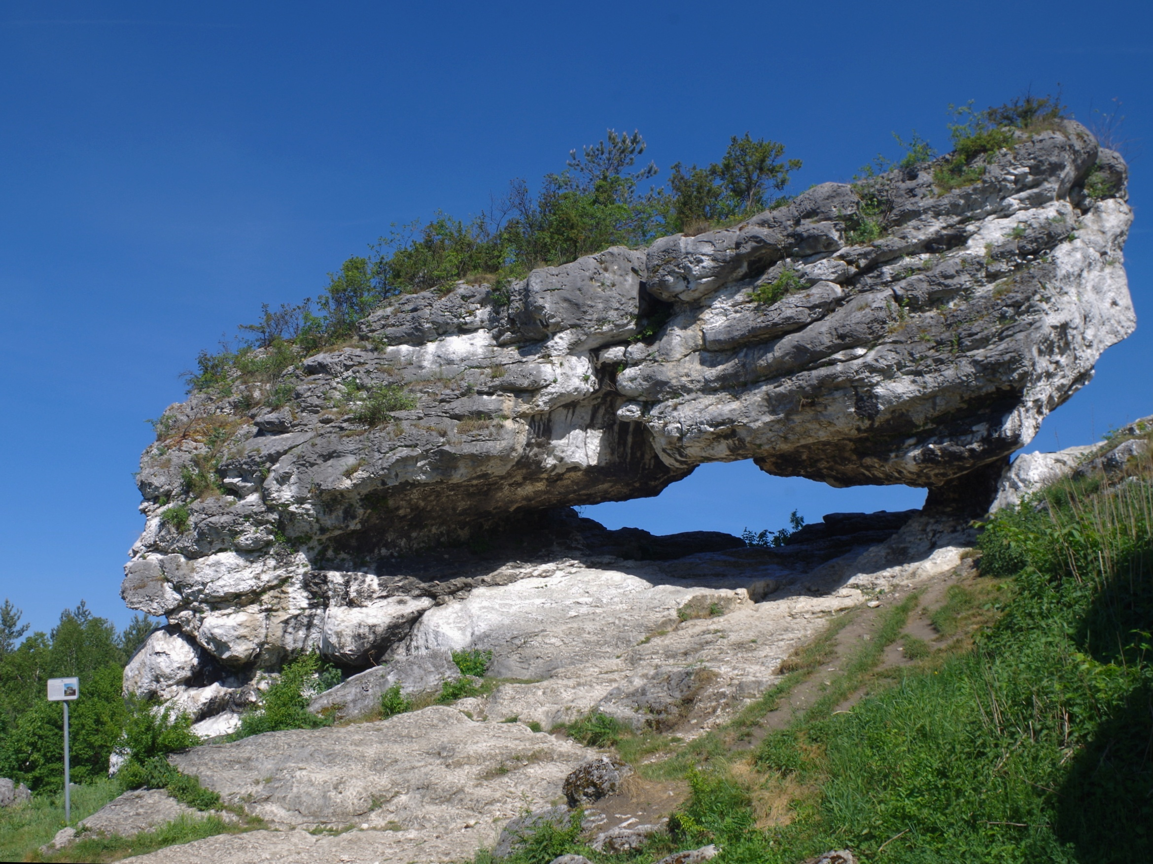 Brama Laseckich przy Zamku w Bobolicach